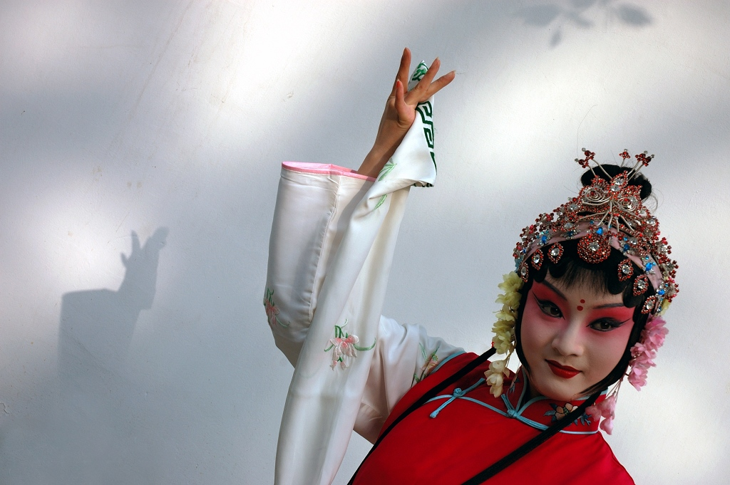 昆曲中的旦